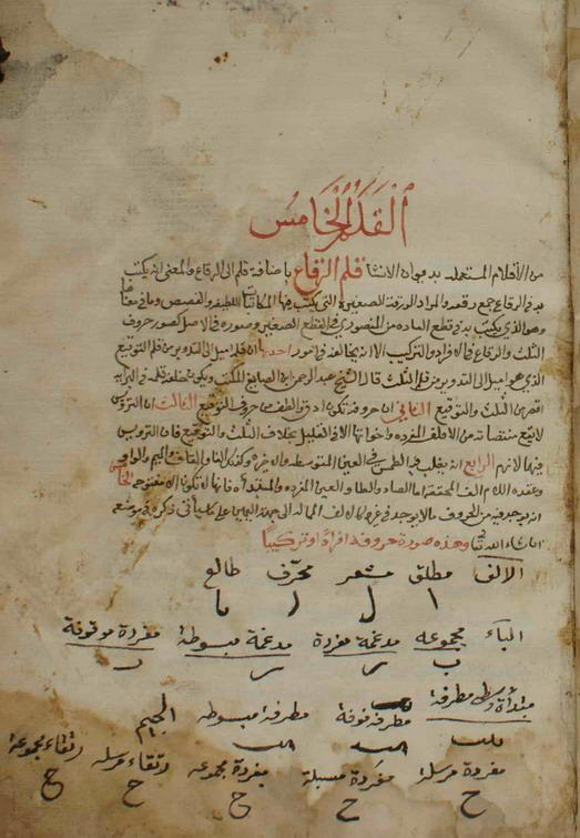 صفحة من نسخة مخطوطة لكتاب صبح الأعشى في صناعة الإنشا - تأليف أحمد بن علي القلقشندي - الناسخ : عطوة بن علي المكنّى بعليق الهونيني العباسي - تاريخ النسخ : ١١٩٣ هـ - المصدر : مكتبة شخصية في جبل عامل- جنوب لبنان